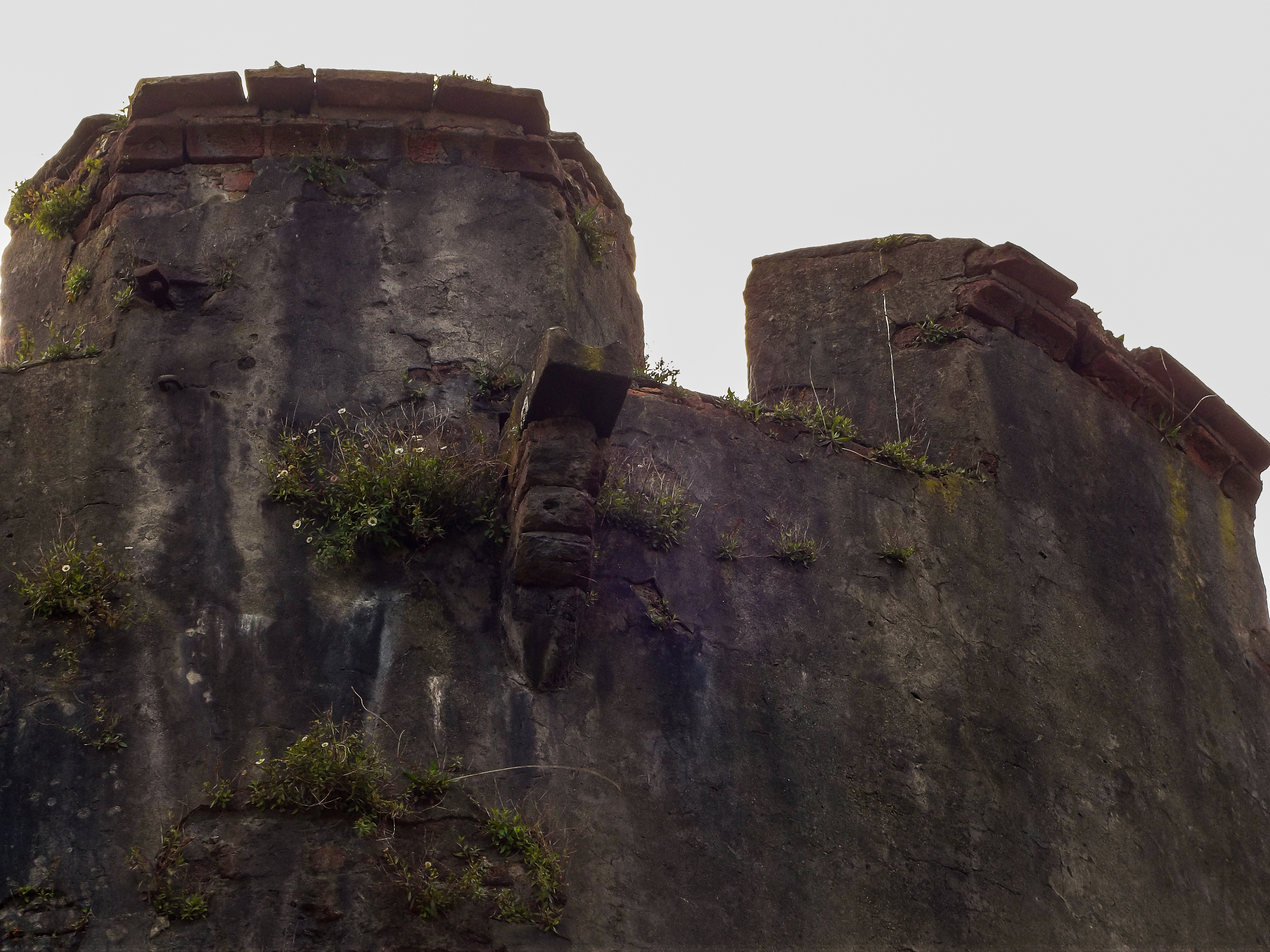 Torreón Picarte This is a photo of a national monument in Chile: 171